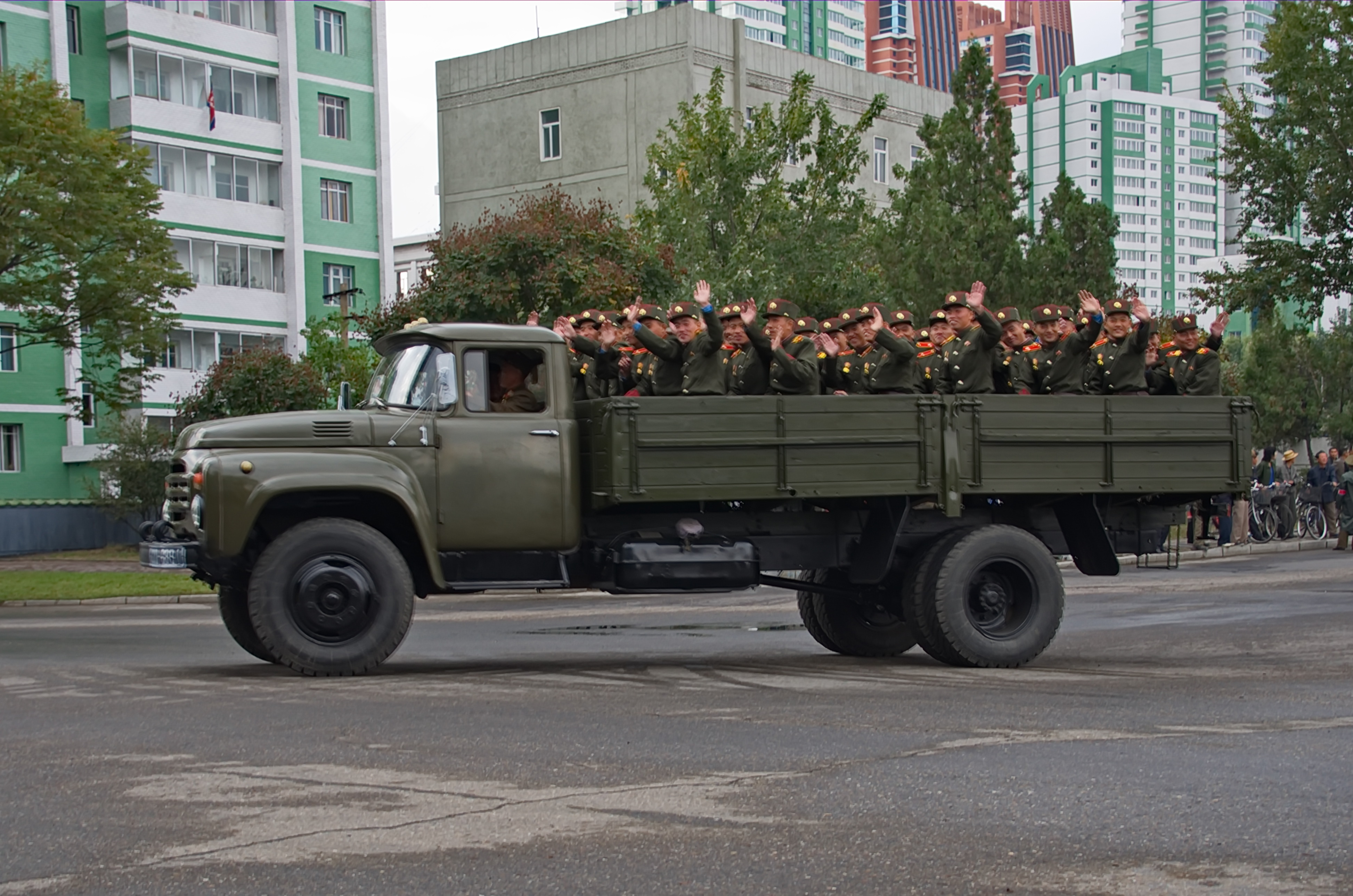 Nordkorea 2015 - Pjöngjang - Parade zum 75. JT der Arbeiterpartei